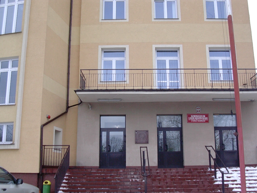 High School in Mińsk Mazowiecki